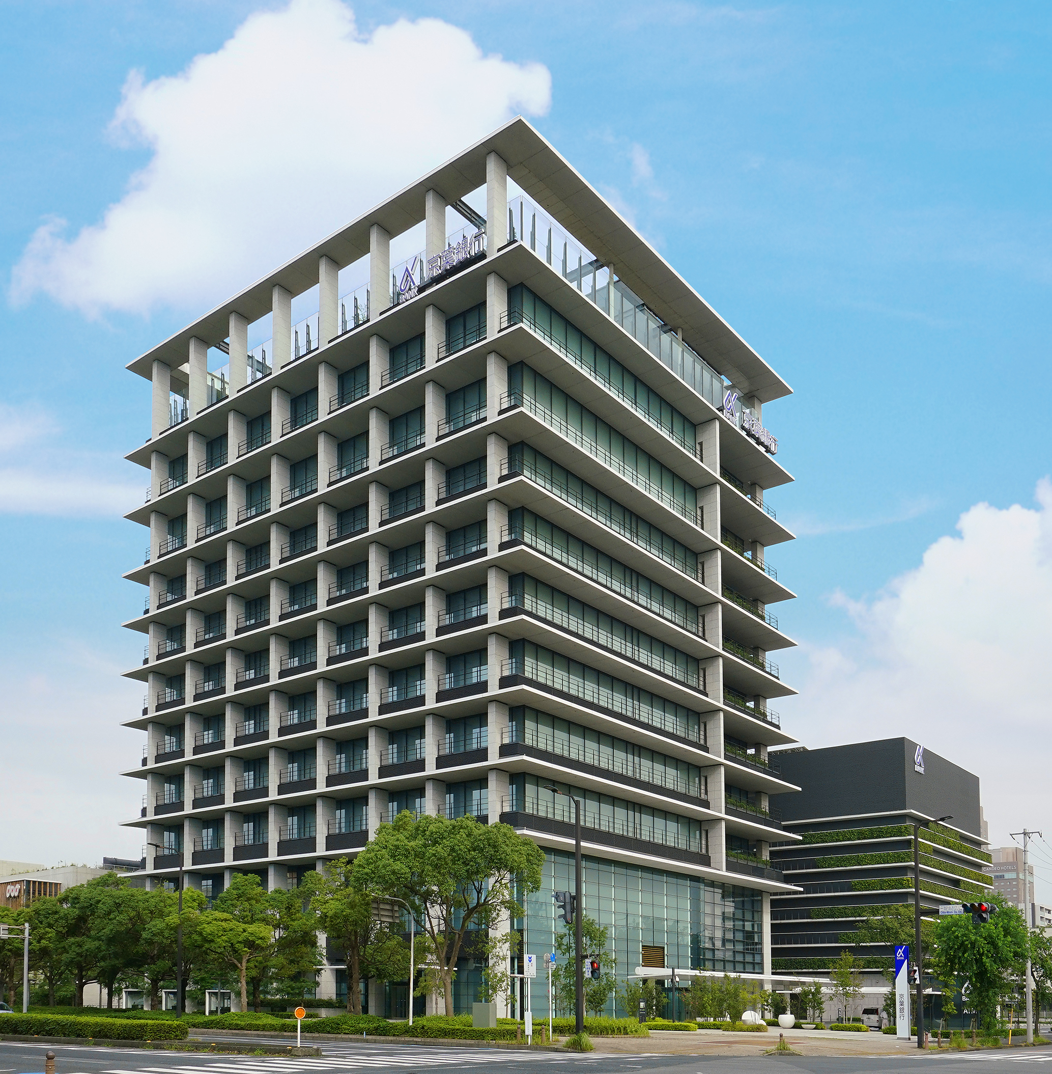 京葉銀行千葉みなと本部